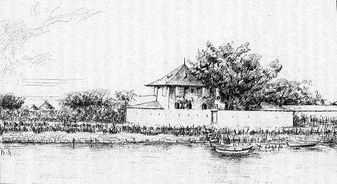 Le poste de Saldé (Sénégal), illustration de Colonel Frey, Côte occidentale d'Afrique, 1890